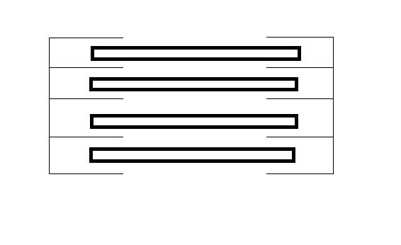 Actine,mysoines Simpel eigengemaakt paint plaatje, ter verduidelink bij een artikel over de spiercel.